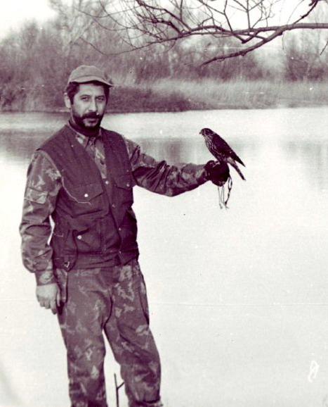 With Merlin (Falco columbarius ?aeasalon / F. aesalon ?aeasalon) during hunting at Jandari Lake, SE Georgia, November 1979